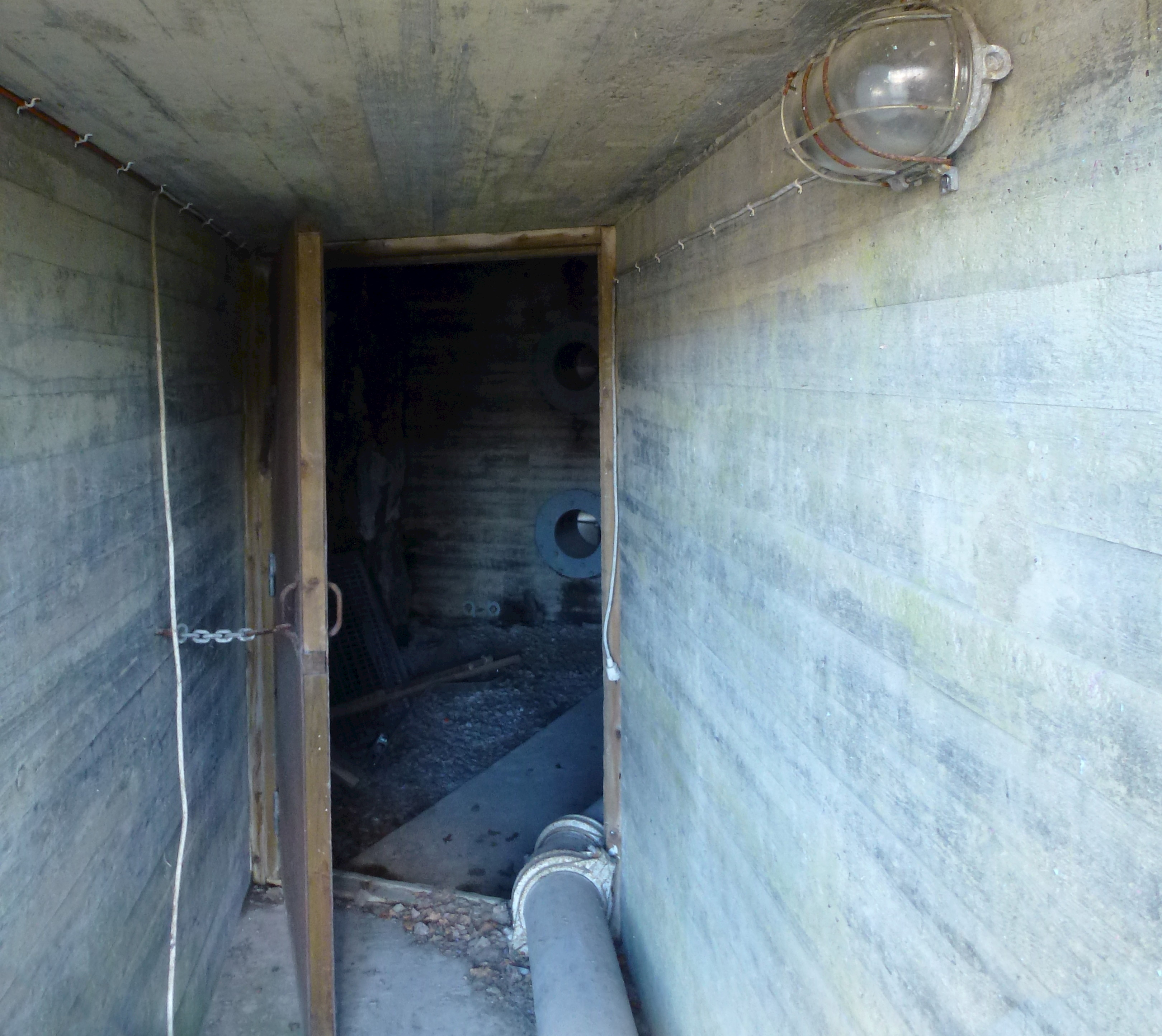 Ledningscentralen "Elefanten" i Sollentuna, frånluftsort